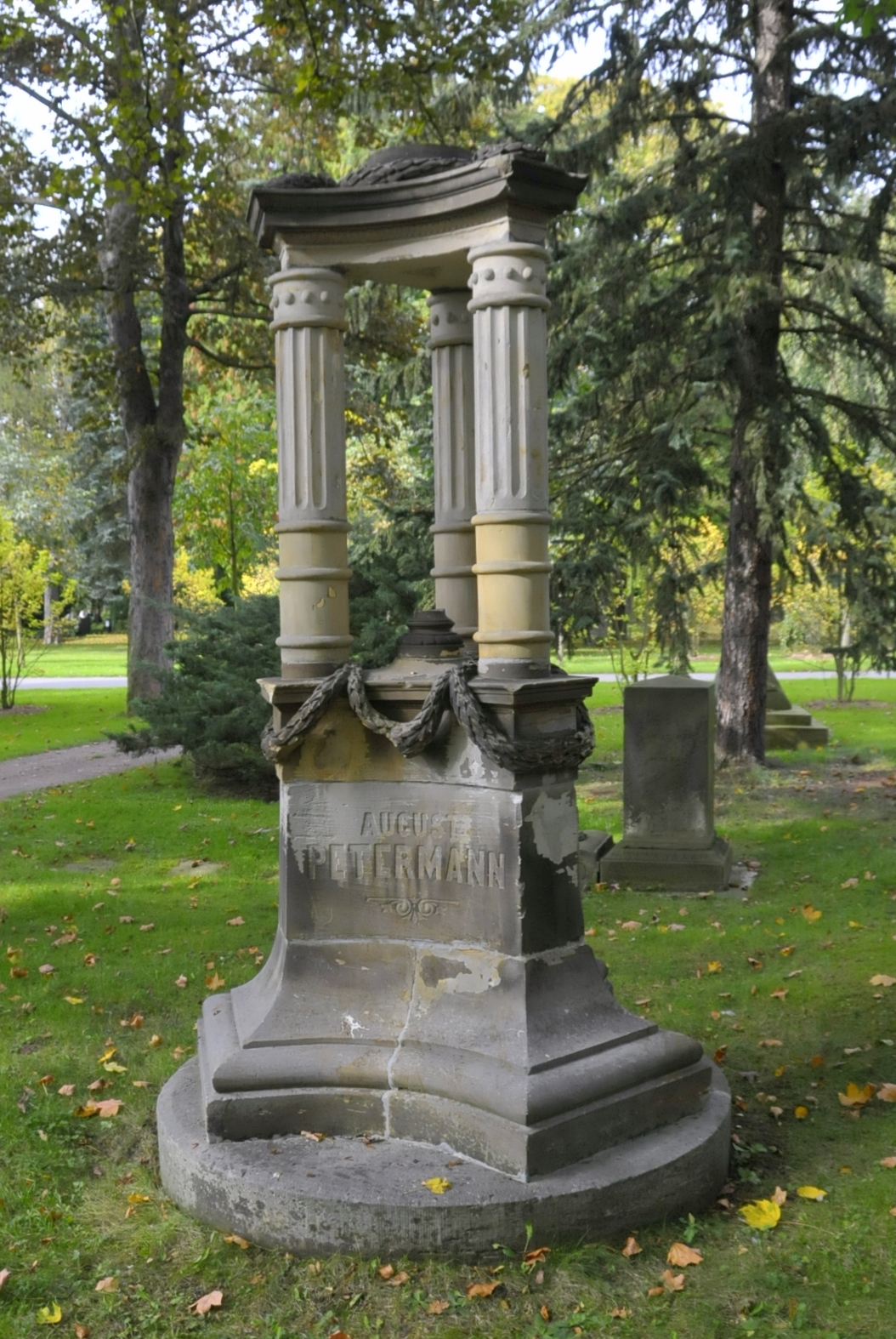 Grabmal des August Petermann auf dem Hauptfriedhof Gotha